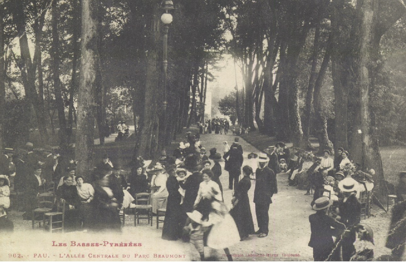 Pau : L'Allée Centrale du Parc Beaumont